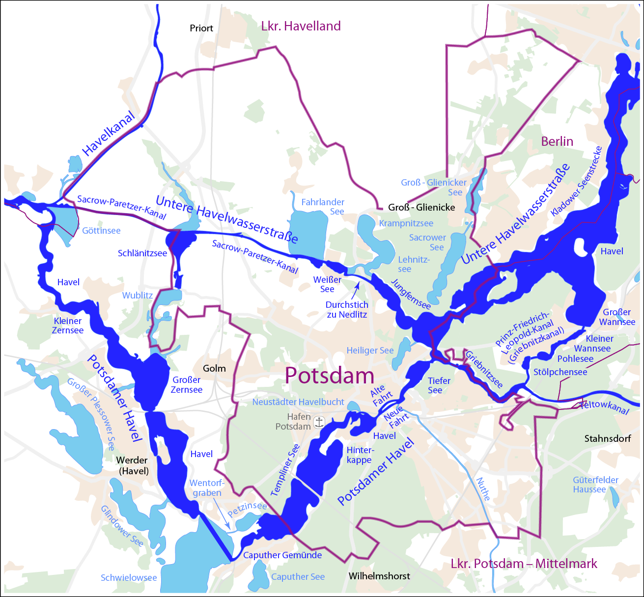 Karte der Wasserstraßen in Potsdam